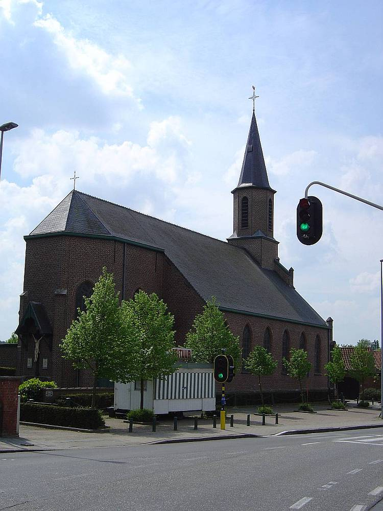 De Sint-Martinus Kerk van Baarle (Drongen)